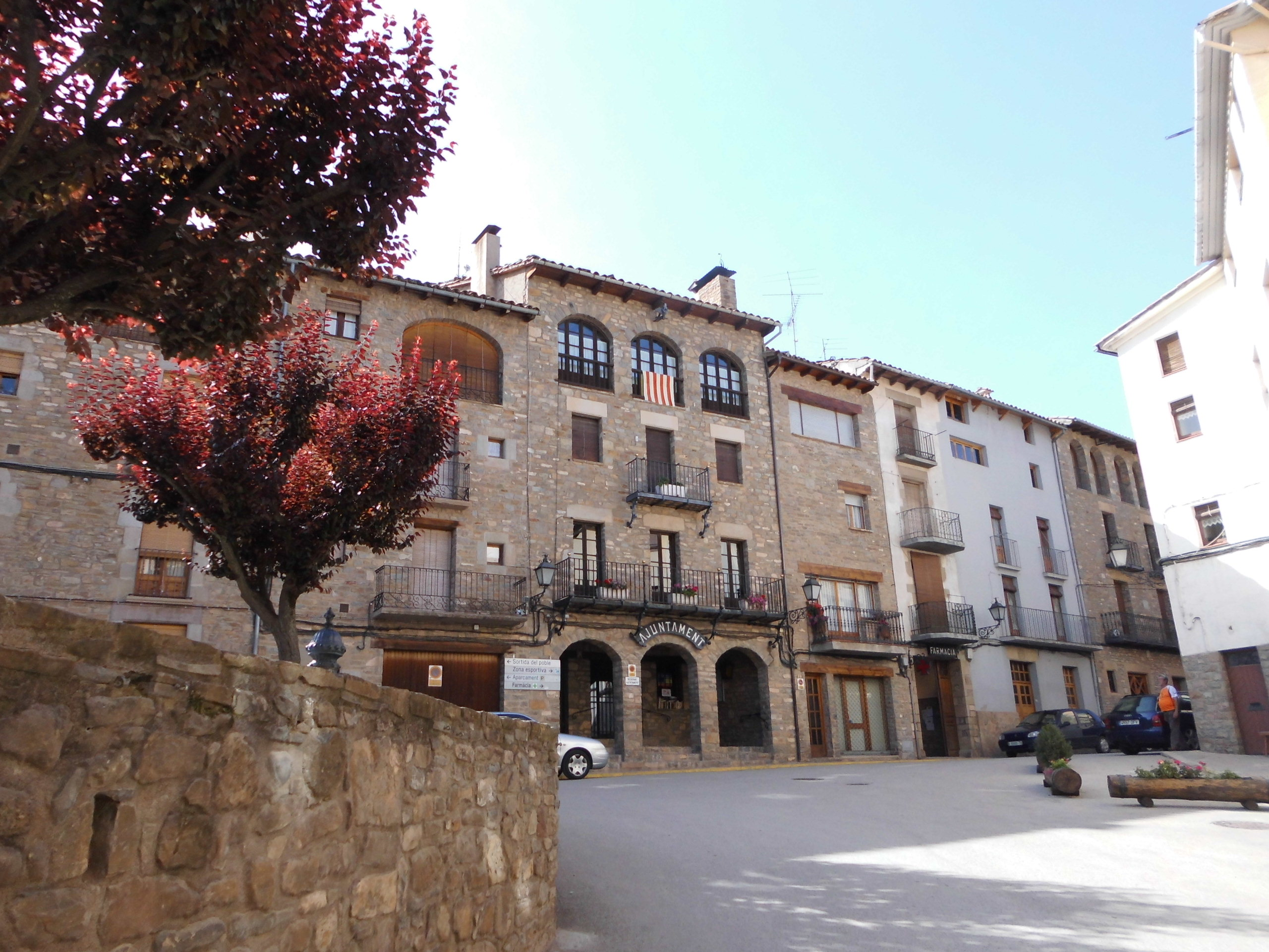 Plaça de l'Ajuntament (Borredà)